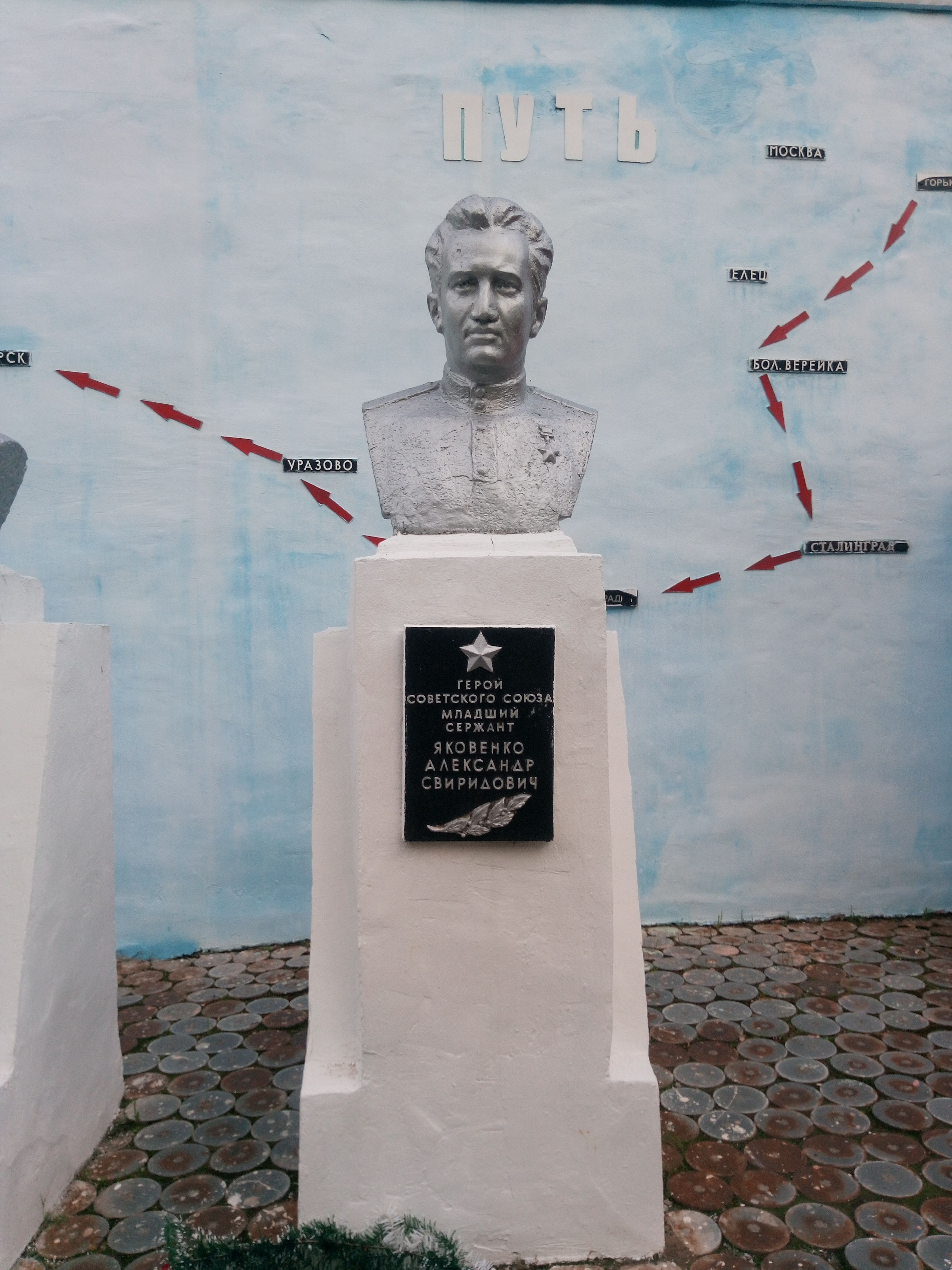 Мар’іна Горка. Мемарыял 8-ай танкавай дывізіі